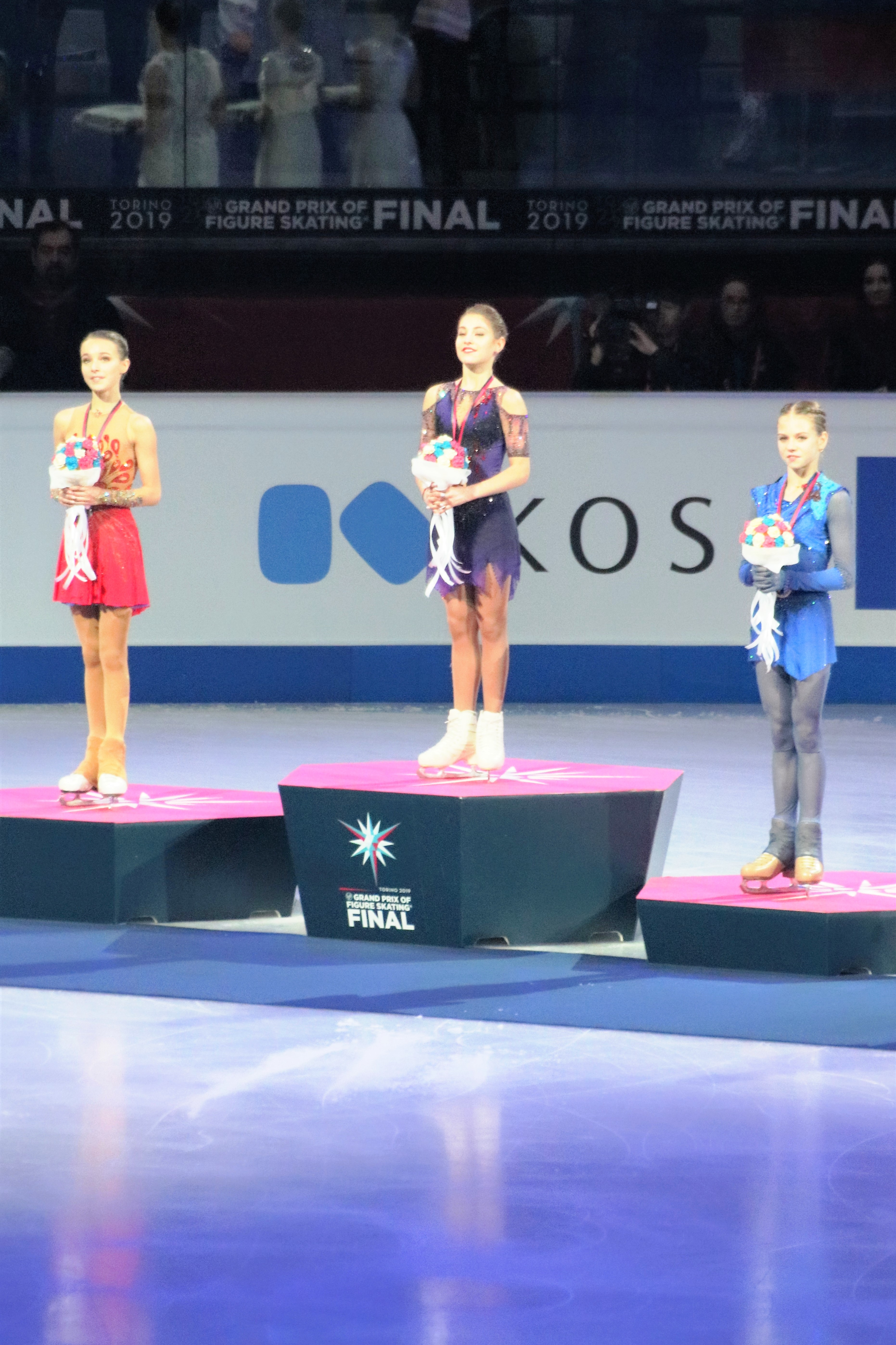 Церемония награждения в женском одиночном катании на финале Гран-при 2019-2020